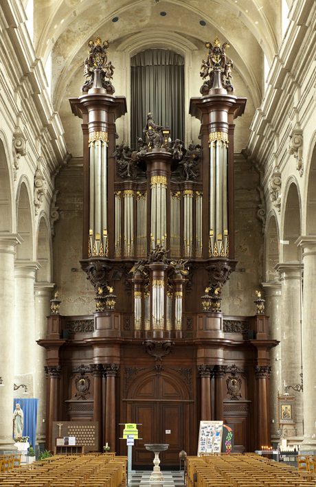 orgelbouwer Jan-Baptist Forceville, werd tussen 1868 en 1873 gebouwd